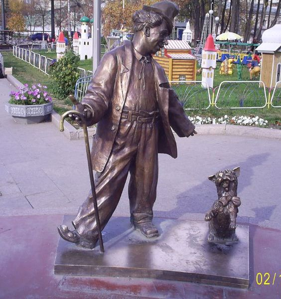 Скульптура Дурова на Цветном (Пешеходном) бульваре в Тюмени